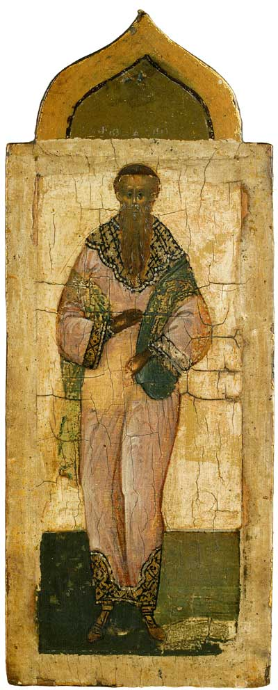 Праотец Гад. Праотеческий чин из церкви Владимирской Богоматери в Ярославле. Конец XVI в. Ярославский художественный музей, Ярославль, Россия